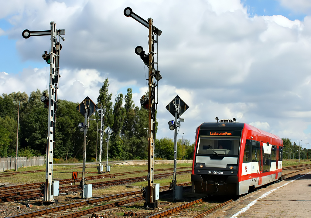 Brodnica